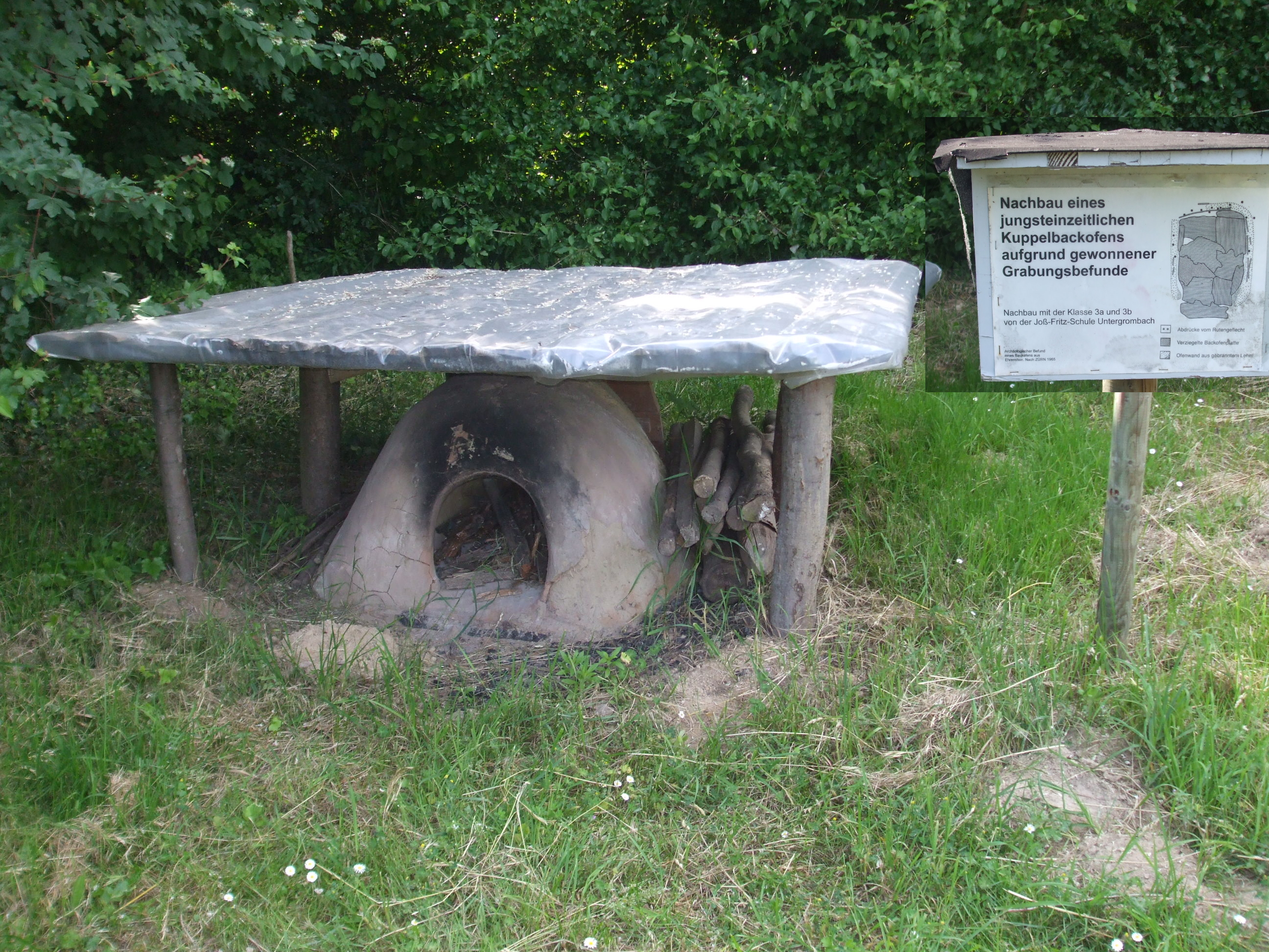 Nachbau eines Kuppelbackofens (Jungsteinzeit) auf dem Michaelsberg (Untergrombach)